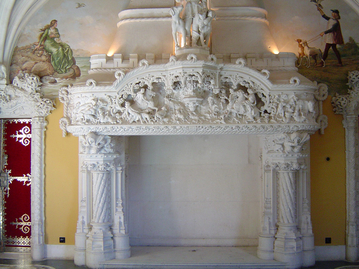 Cheminée du Palais da Regaleira à Sintra au Portugal Photo Prise le 20 juillet 2005 avec un appareil Sony DSC-P72